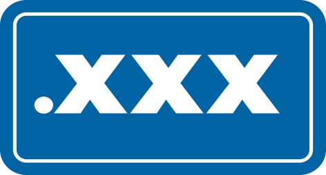 .xxx logo.